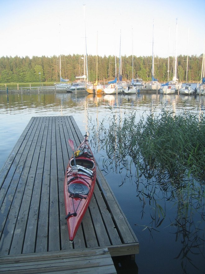 Laiturille lounastauon ajaksi nostettu merikajakki Marjaniemen melojien laiturilla Helsingin Marjaniemessä (2004). Huom: Muista säilyttää viittaus kuvaajaan, mikäli käytät kuvaa.